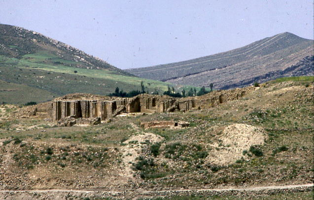 Kalâa des Béni Hammad, Algérie